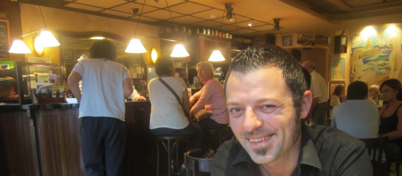 David Rubin nunha entrevista no 2012.